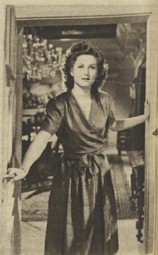 Dagmar Frýbortová (1925-2012), česká herečka.